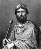 Louis IV, dit d'outremer, roi De France (V.940-986) Louis IV of France